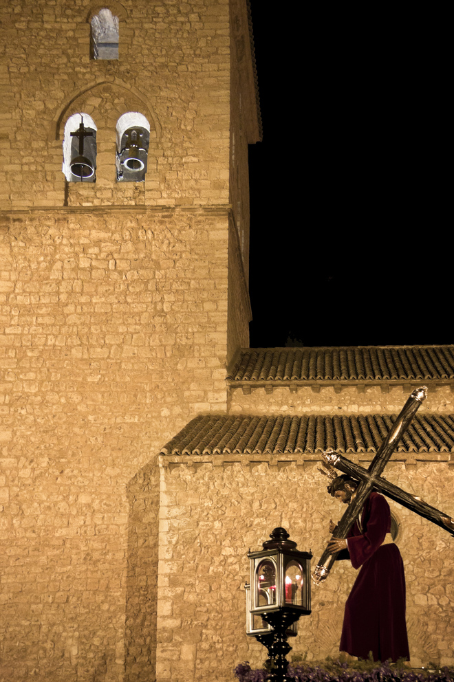 Iglesia de Santiago (Ciudad Real) durante la procesión del Cristo de las Penas en la noche del Martes Santo.